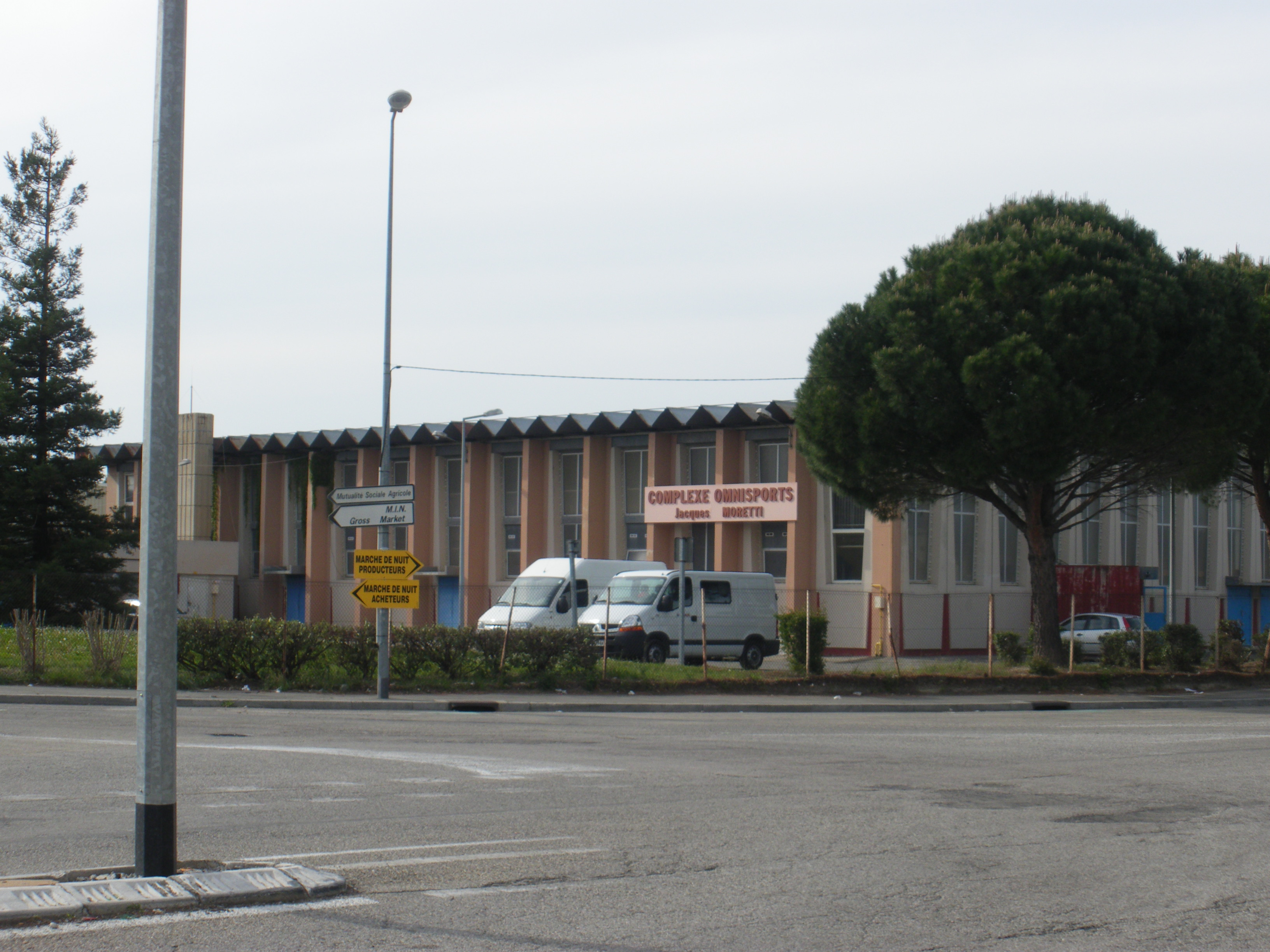 Cosec Moretti, salle de Basket de la ville d'Avignon